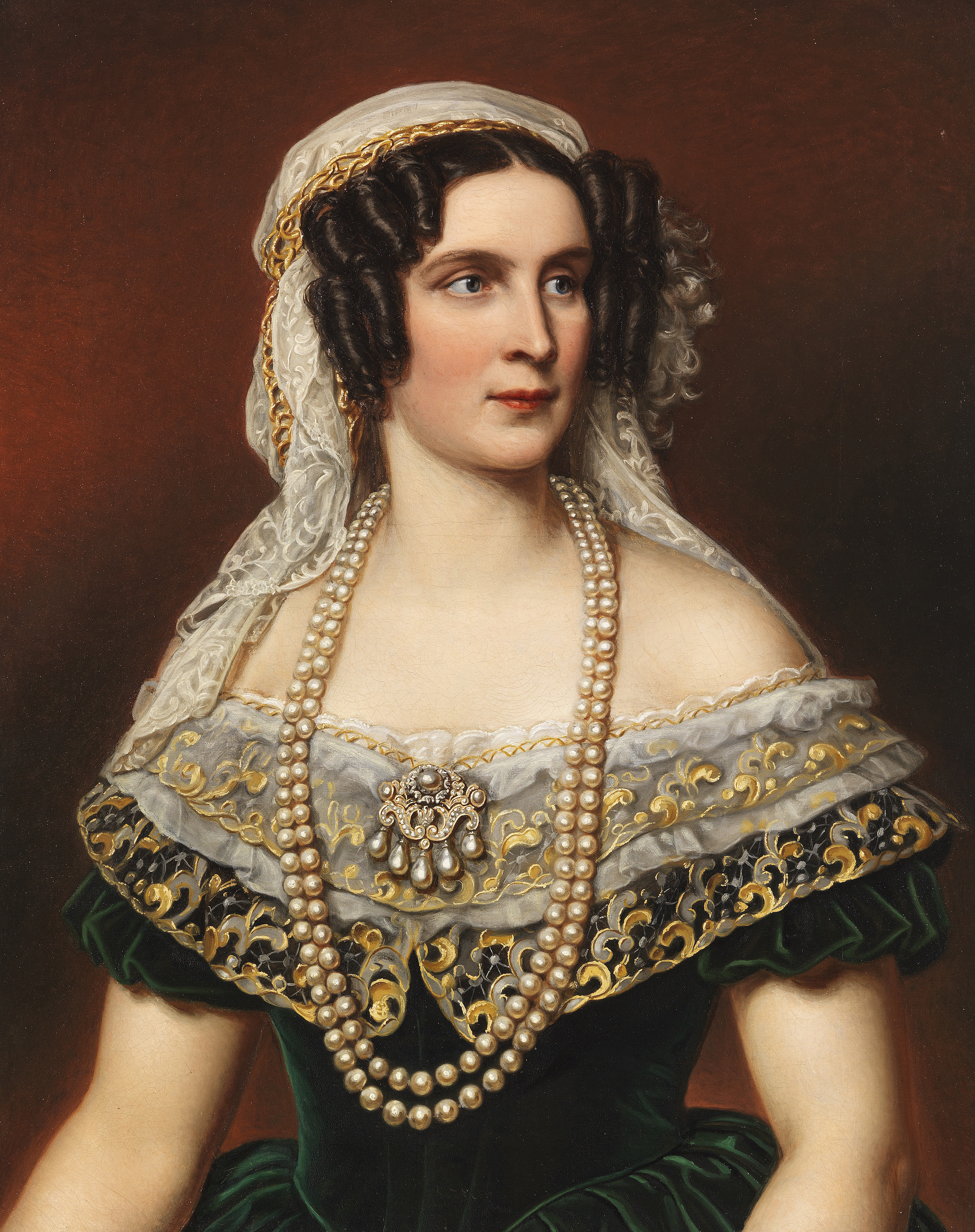 Königin Therese von Bayern. 1855. Oil on canvas. Hase-Schmundt 203. 76.5 x 61 cm (30.1 x 24 in). Verso of canvas signed, dated and inscribed "Ihre k. Majestät, Therese, Königin v. Bayern. / gemalt v. Jos: Stieler 1855." as well as with canvas stamp. [CB].